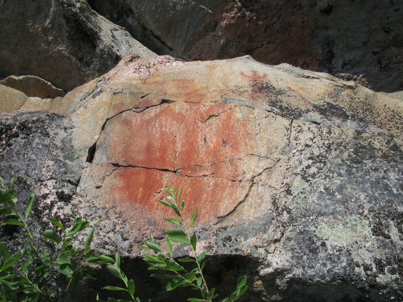 Kolmiköytisienvuoren kalliomaalaus.